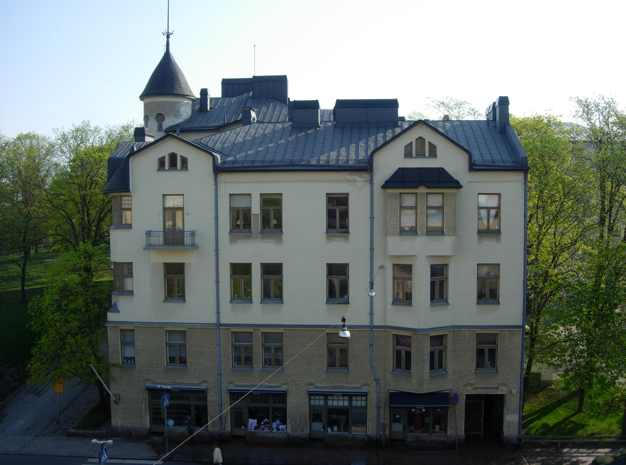 Frithiof Strandellin suunnittelema Hjorten/Kalven (1906). Kaskenkatu 4, Turku.